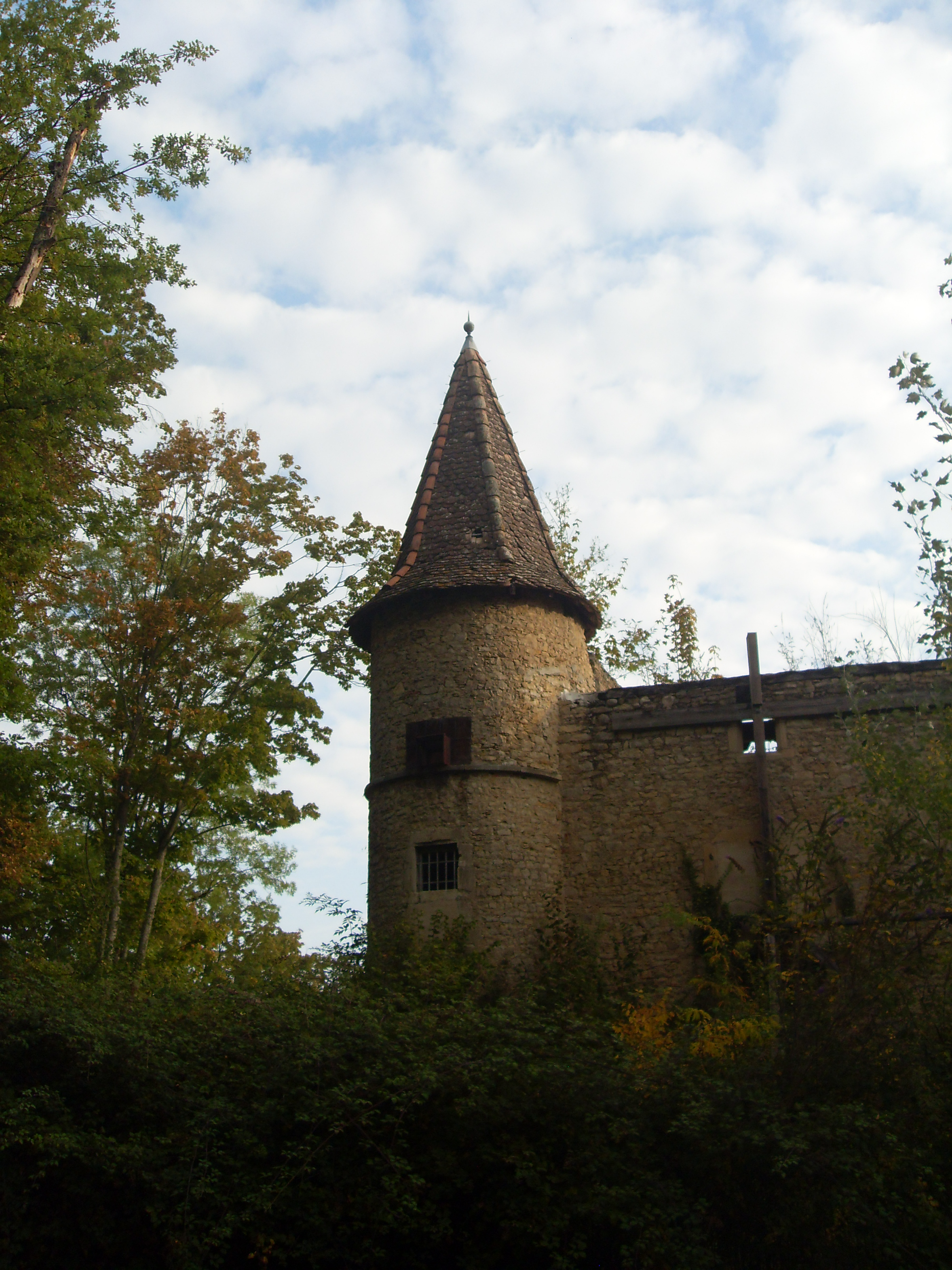 Ruines du Château du Vellein - Villefontaine (Isère).